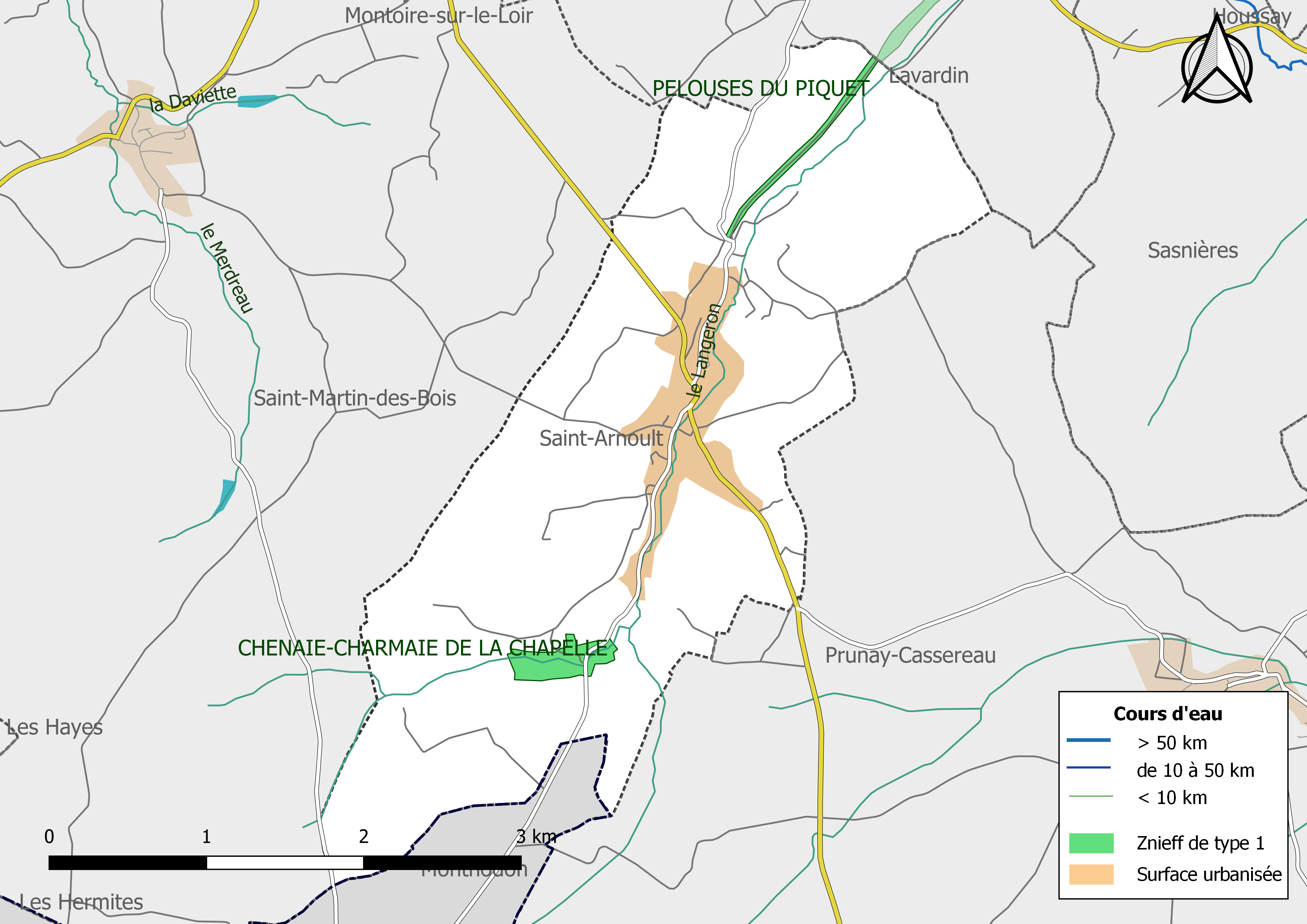 Zones naturelles d'intérêt écologique faunistique et Floristique (ZNIEFF) de type 1 de la commune de Saint-Arnoult (Loir-et-Cher) (France).